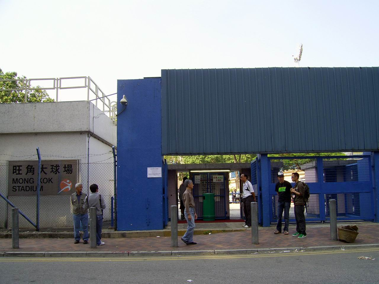 中文（香港）: 旺角大球場花墟道大閘入口